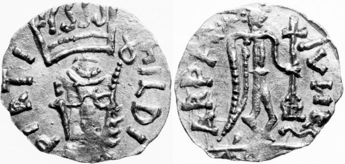 Trémissis de Childebert Ier, Arpajon-sur-Cère (534-558). BNF, monnaies, médailles et antiques. Avers : Buste diadémé à droite. Revers : Victoire debout à droite tenant une croix.